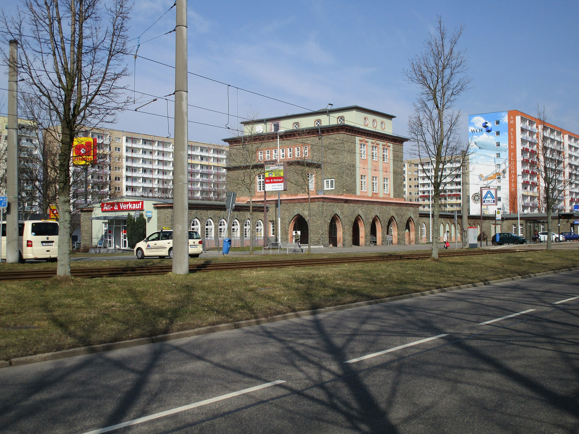 Das ehemalige Flughafengebäude des Flughafens Chemnitz im Jahr 2015.